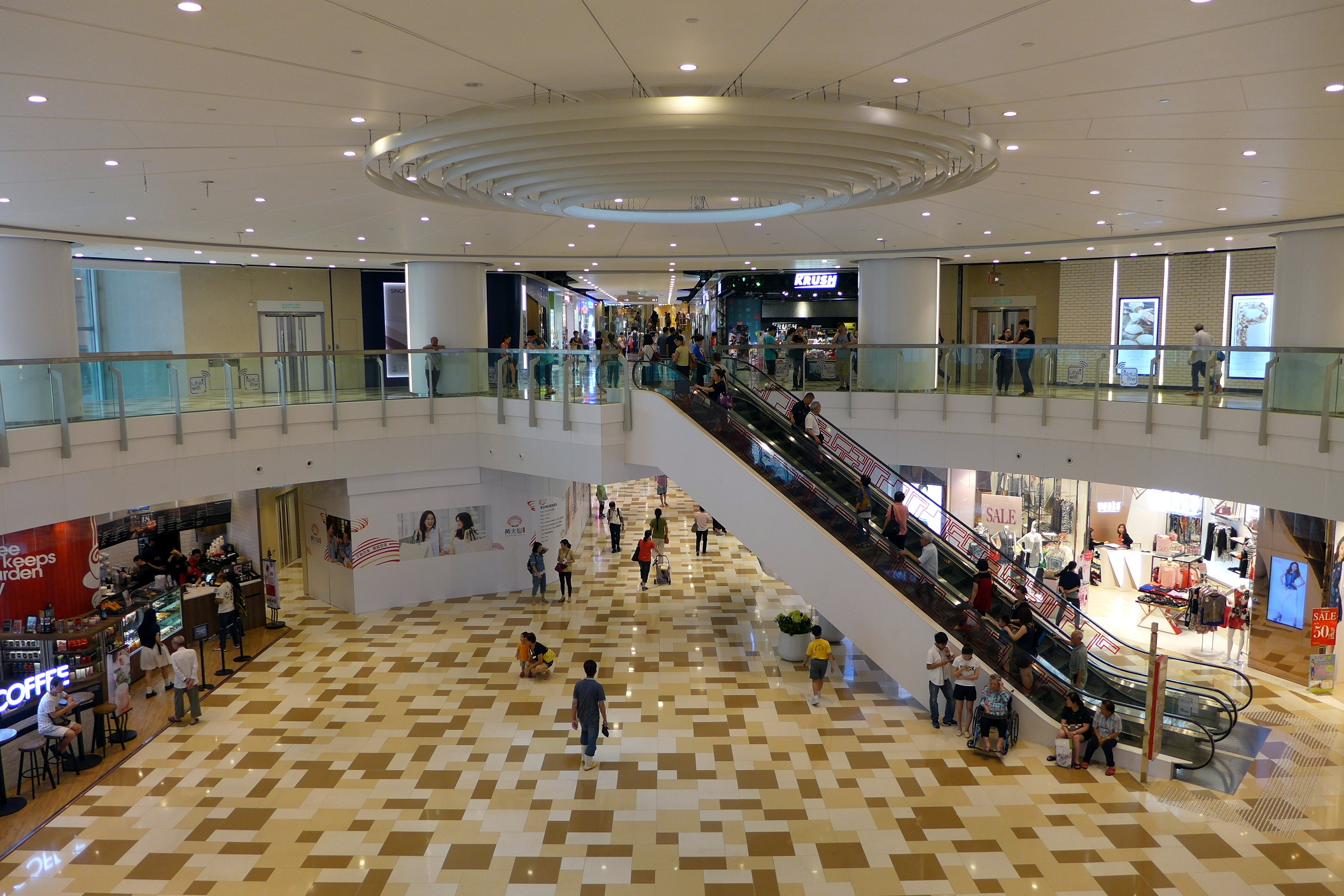 Temple Mall Void view